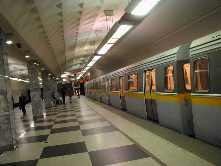 Станция метро Братиславская